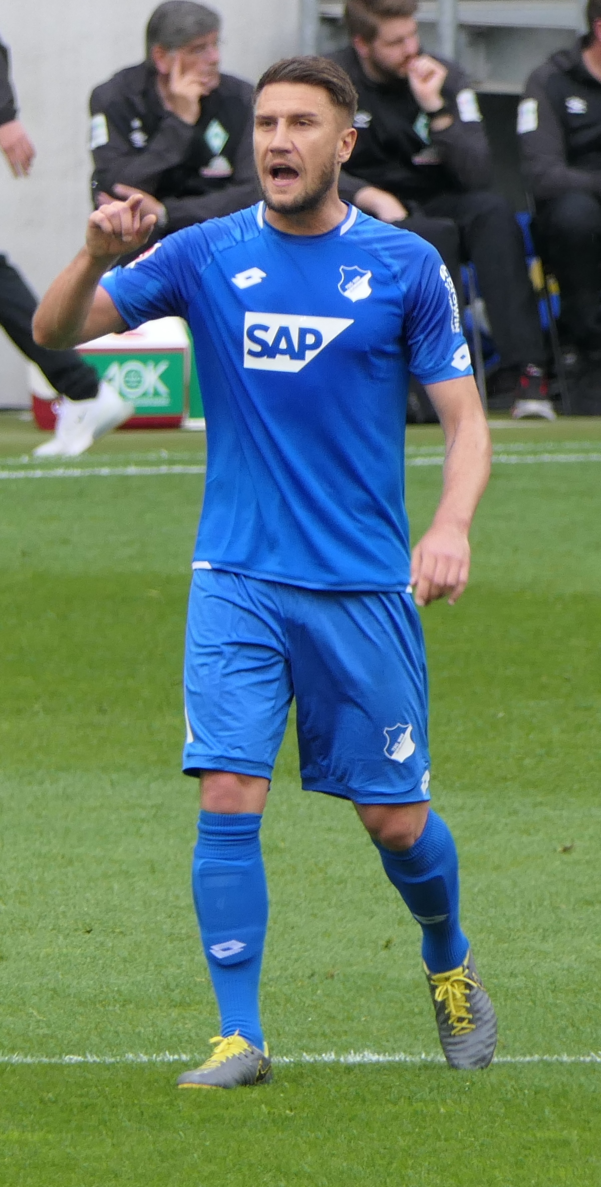 Der Fussballprofi Ermin Bičakčić im Trikot der TSG 1899 Hoffenheim beim Heimspiel gegen den SV Werder Bremen am 11.05.2019.